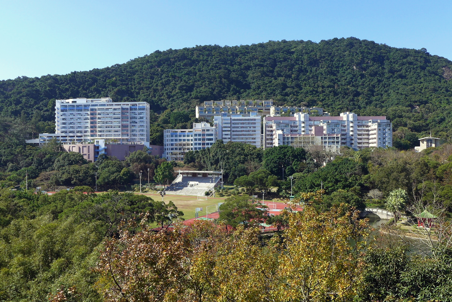 Esther Lee Building and Chen Kou Bun Building